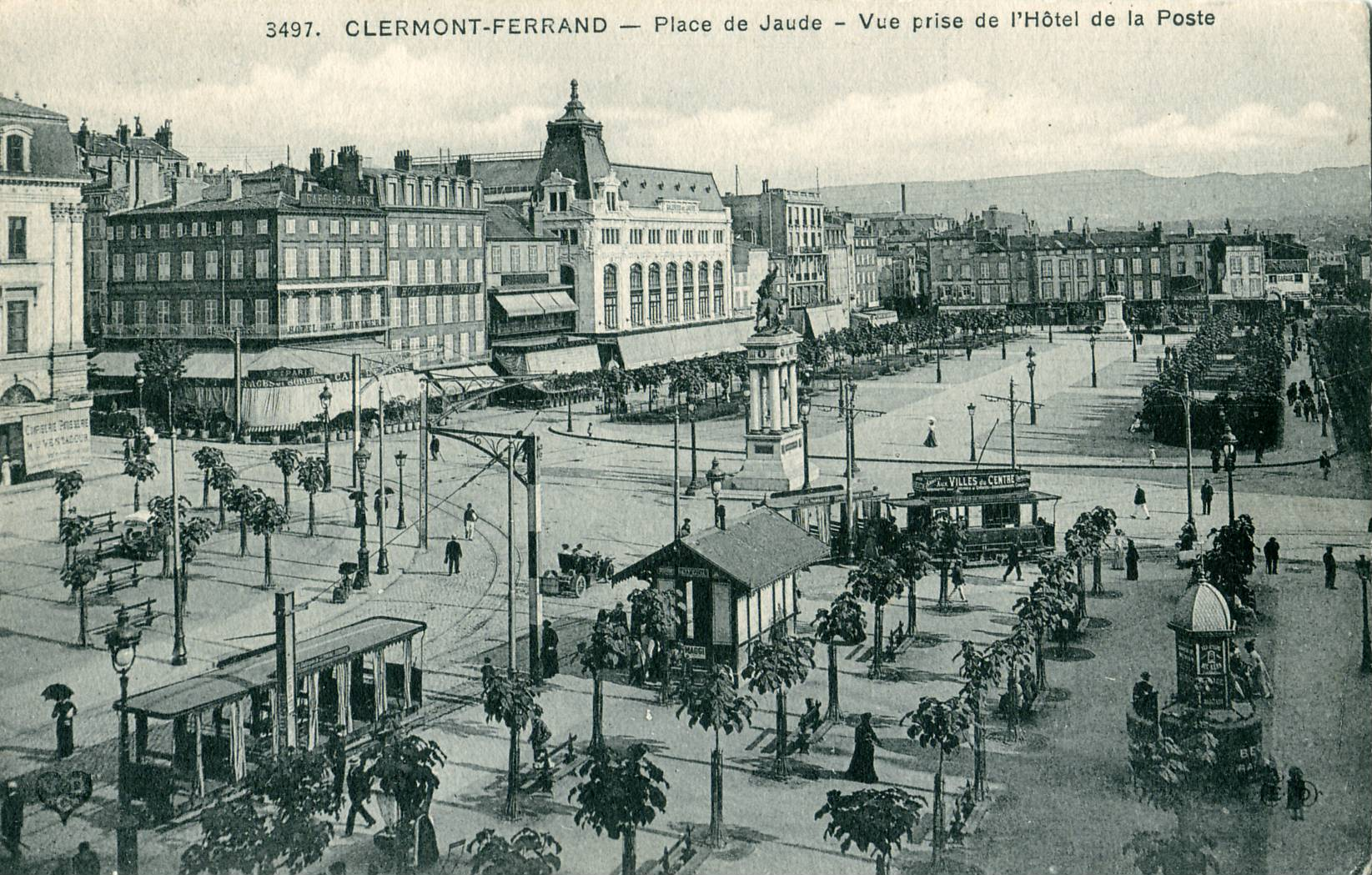 Carte postale ancienne éditée par ELD, n°3497 CLERMONT-FERRAND - Place de Jaude - Vue prise de l'Hôtel de la Poste